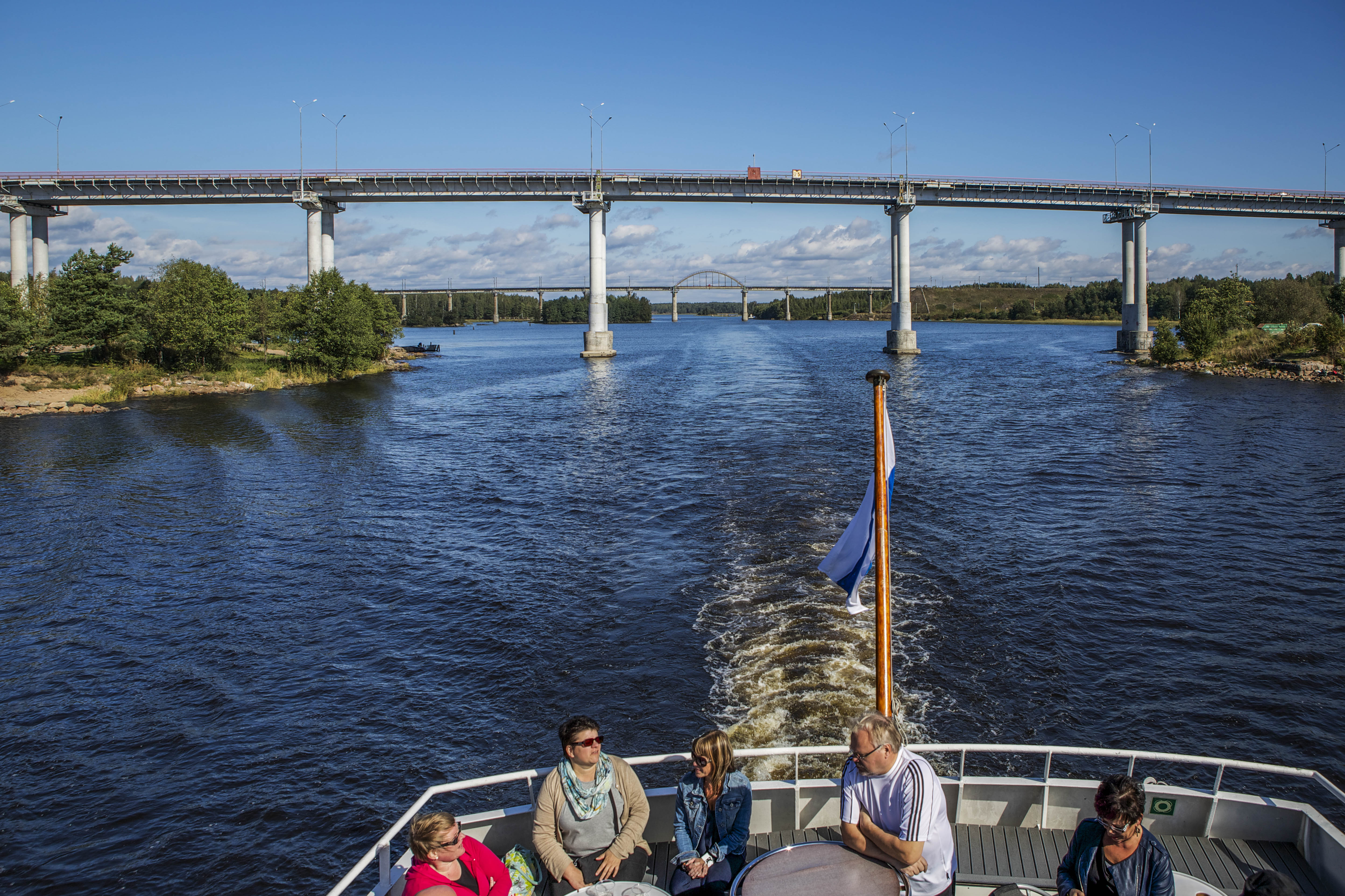 Vyborg, Russia